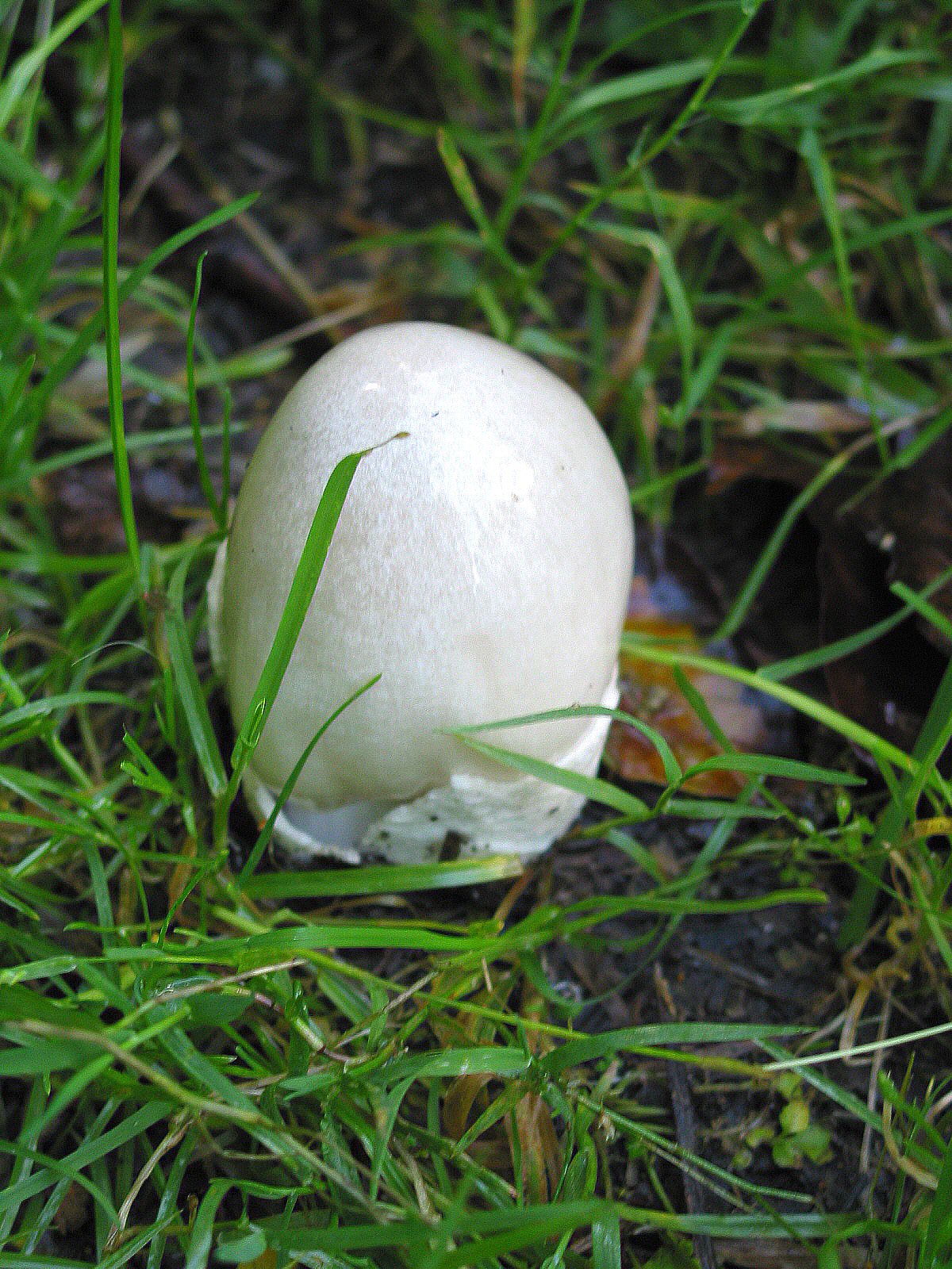 Volvariella gloiocephala à l'état jeune/at young state - Havré (Belgique/Belgium), forêt de feuillus - clairière (sur sciure d'arbres tronçonnés)./ leafy forest glade (on sawdust of cut up trees).